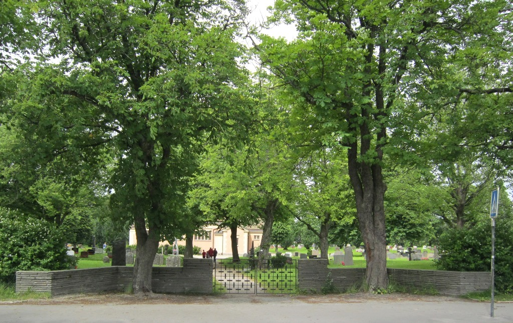 Østre Fredrikstad gravlund